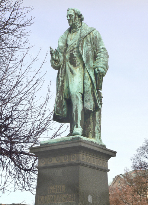 Bronzestatue Karl Karmarsch von Oskar Rassau und Heinrich Köhler (1830-1903) in Hannover, Georgstrasse Foto aufgenommen von Benutzer Benutzer:AxelHH, Februar 2006